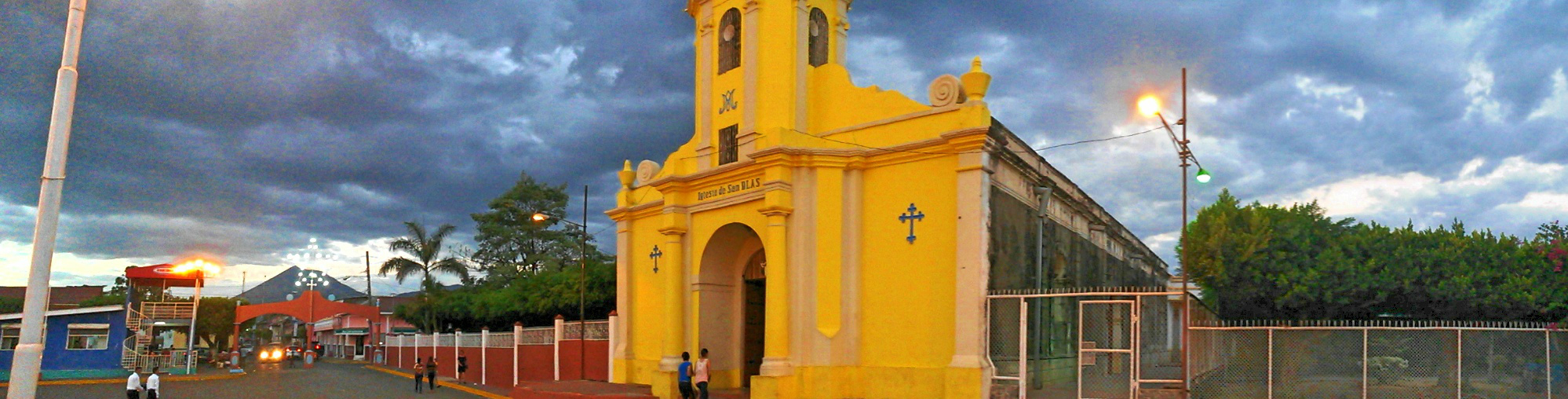 Plaza E Iglesia Central De Chichigalpa Parque Ruben Dario